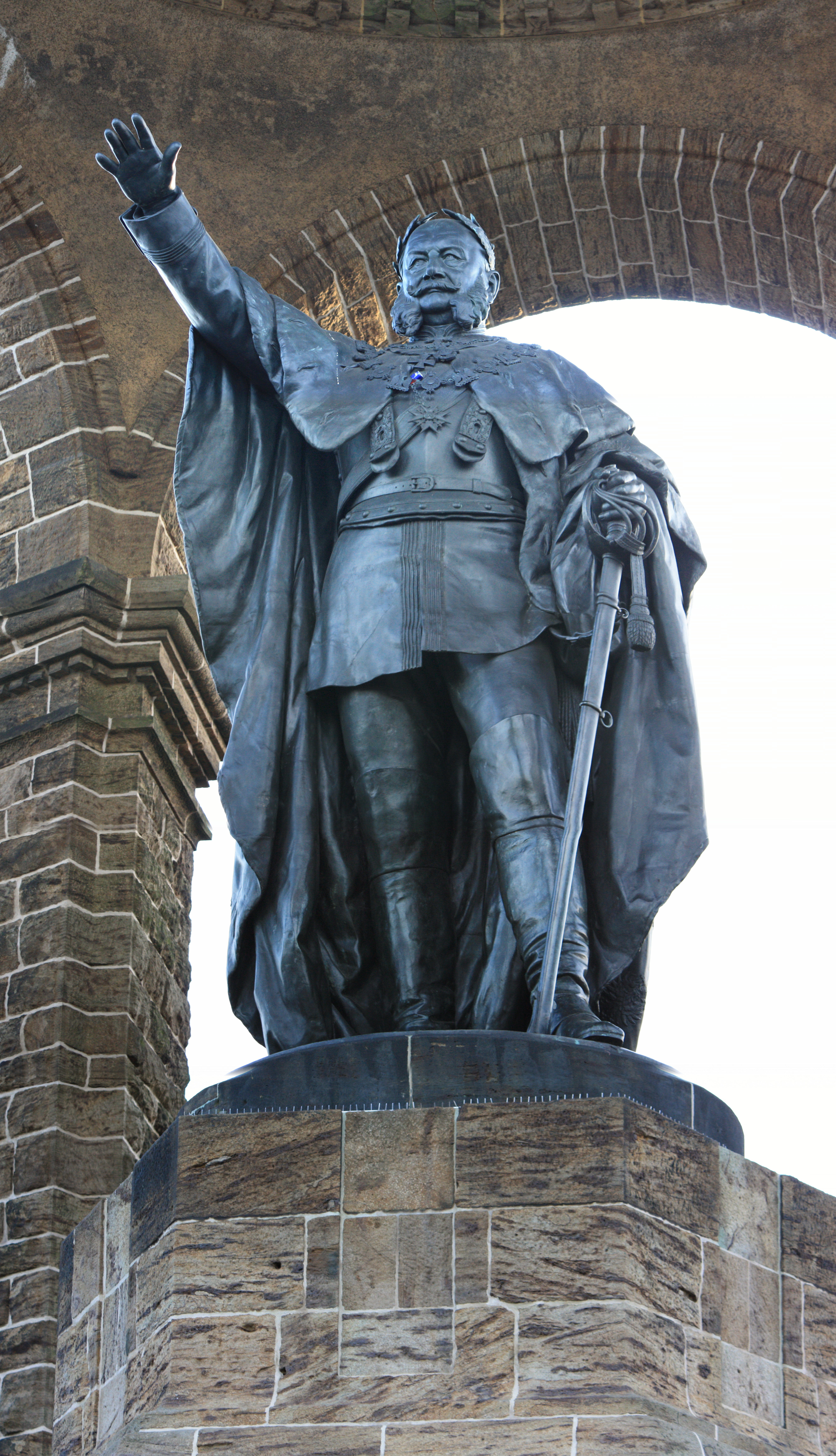 Statue des Kaiser-Wilhelm-Denkmals an der Porta Westfalica